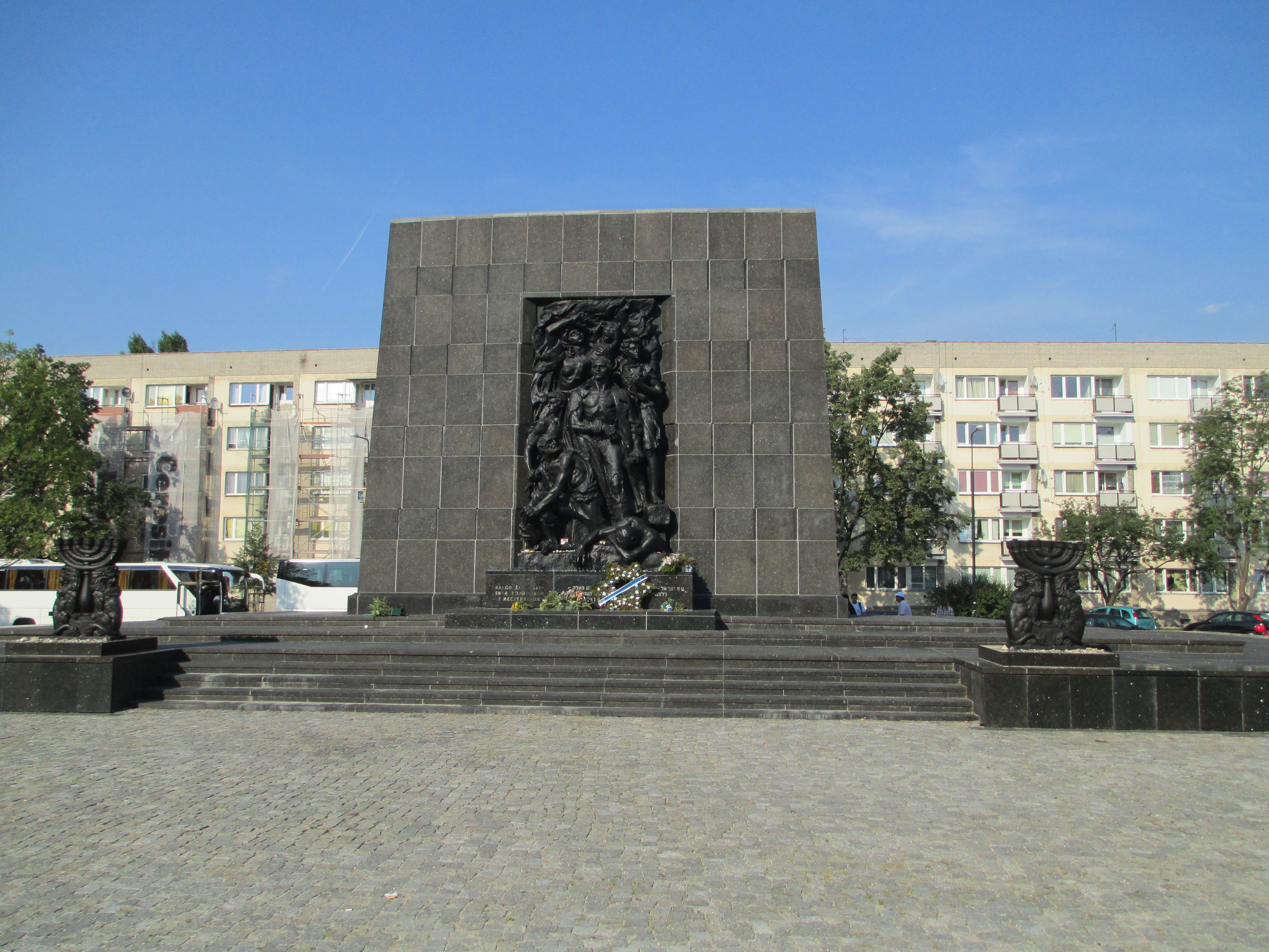 מבט כללי על אנדרטת מרד גטו ורשה, בוורשה